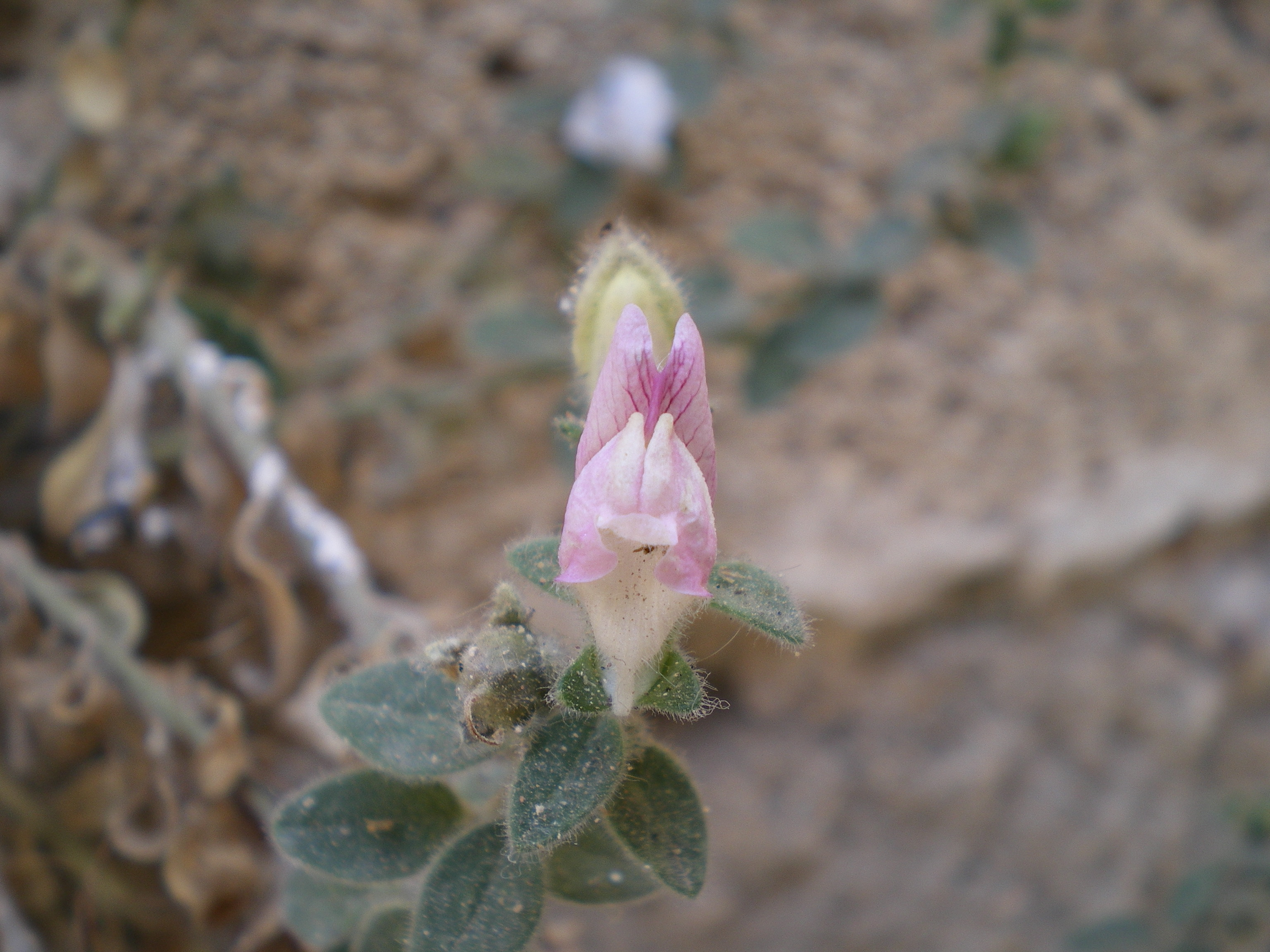 Fotografía de Antirrhinum hispanicum ssp. mollissimum, sobre los muros de la Catedral de Almería